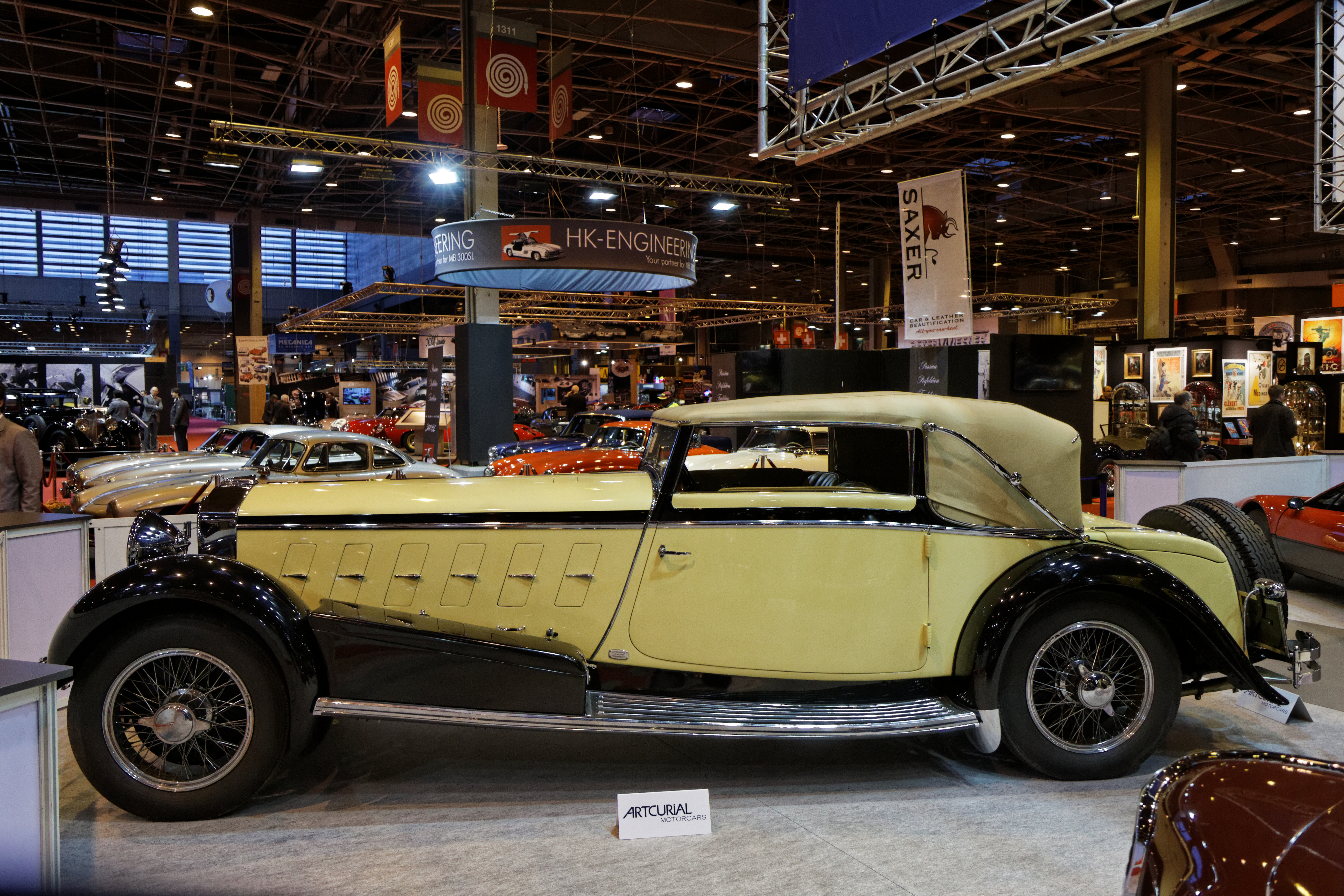 Une Isotta Fraschini 8A cabriolet Ramseier exposée lors du salon Retromobile 2014